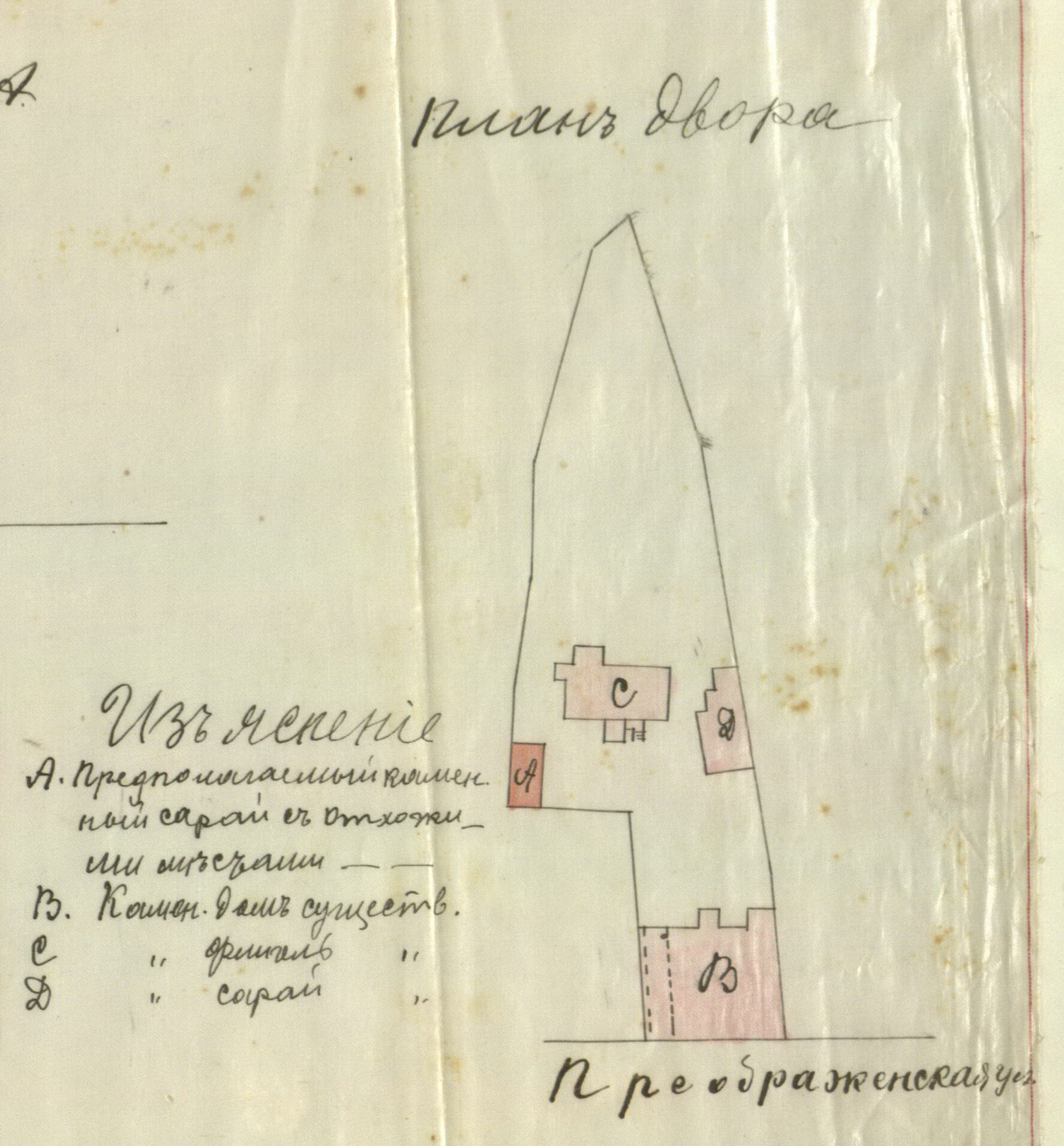 Беларуская (тарашкевіца): Менск (Miensk), вуліца Зборавая (vulica Zboravaja). План сядзібы дома Маскаліка (Maskalik)